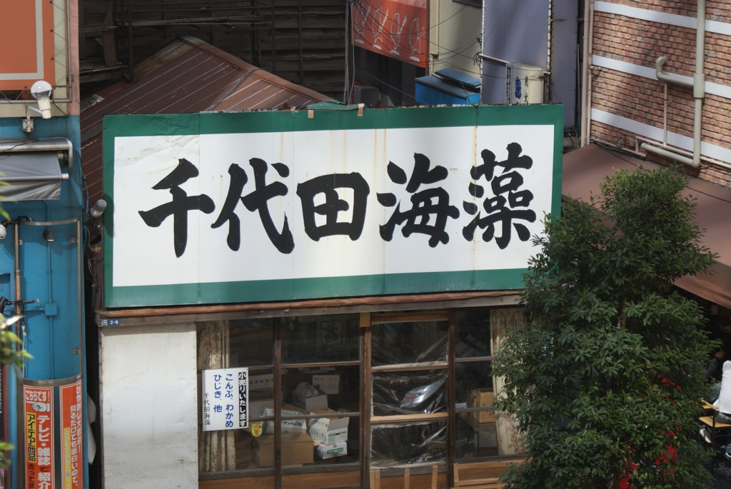 Chiyoda Kaisō, Akihabara